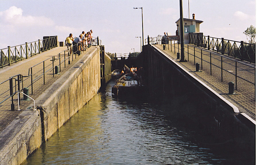 propre photo